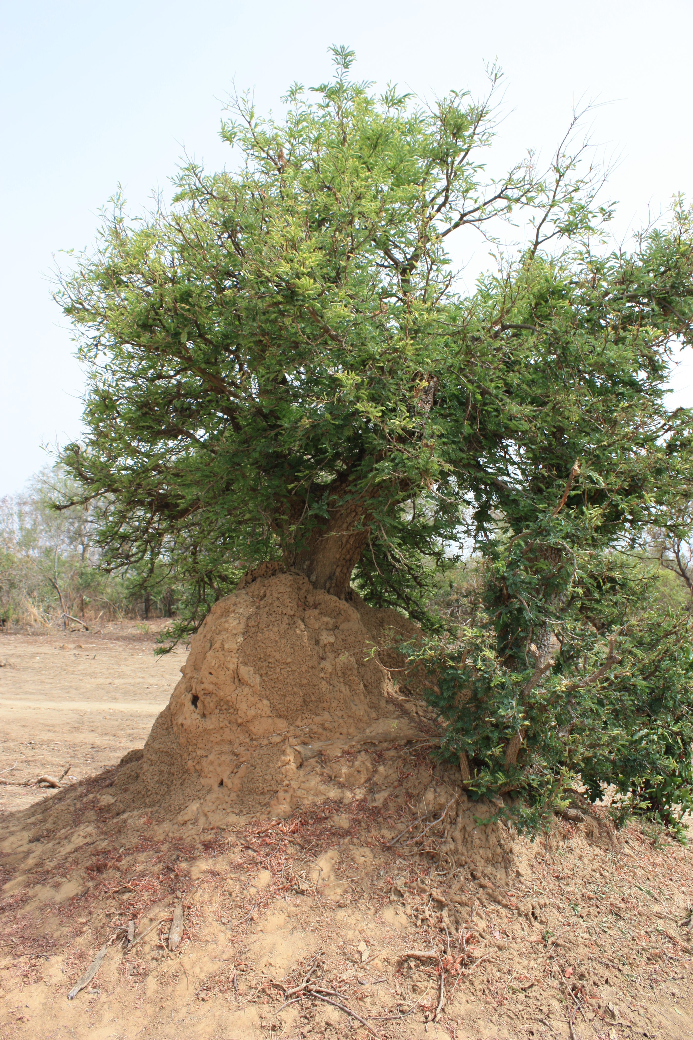 Tamarindus indica on a termite mound in Pama Reserve, Burkina Faso